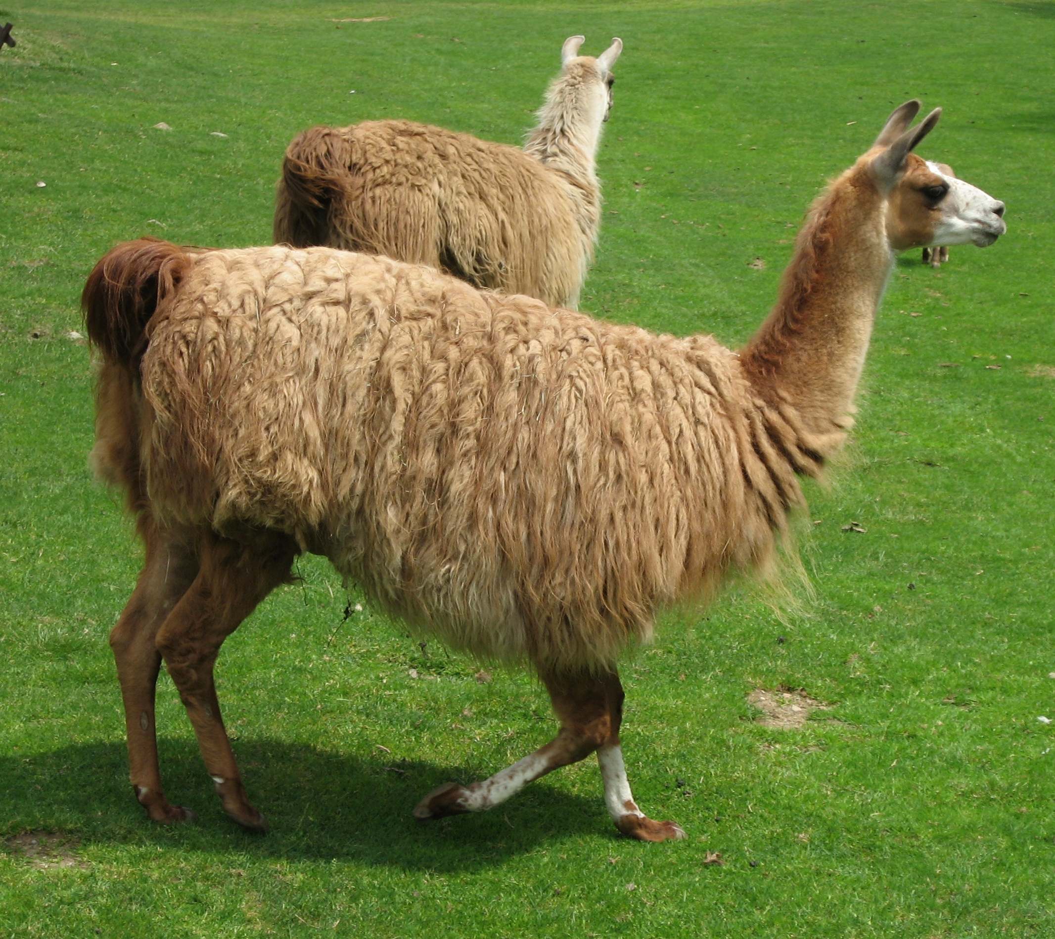 Lama glama in Parc de Merlet (Lama) Map: 45° 54' 26" N 6° 49' 2" E